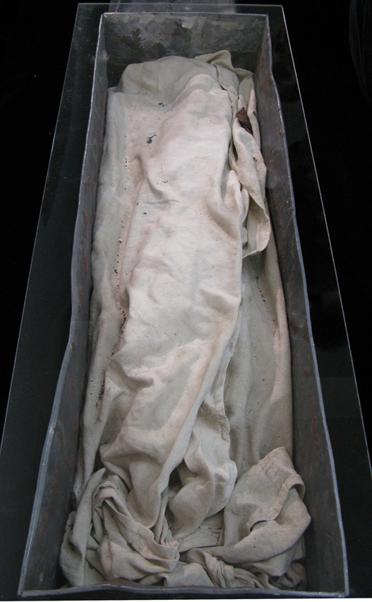 Blick in die bleierne Grabkiste der Königin Editha († 946). Sie befand sich in Folge einer Umbettung vermutlich seit etwa 1510 in einem steinernen Sarkophag im Magdeburger Dom. Auf Grund archäologischer Ausgrabungen wurde der Sandsteinsarkophag abgebaut, in seinem Inneren fand man den kleinen Bleisarg.